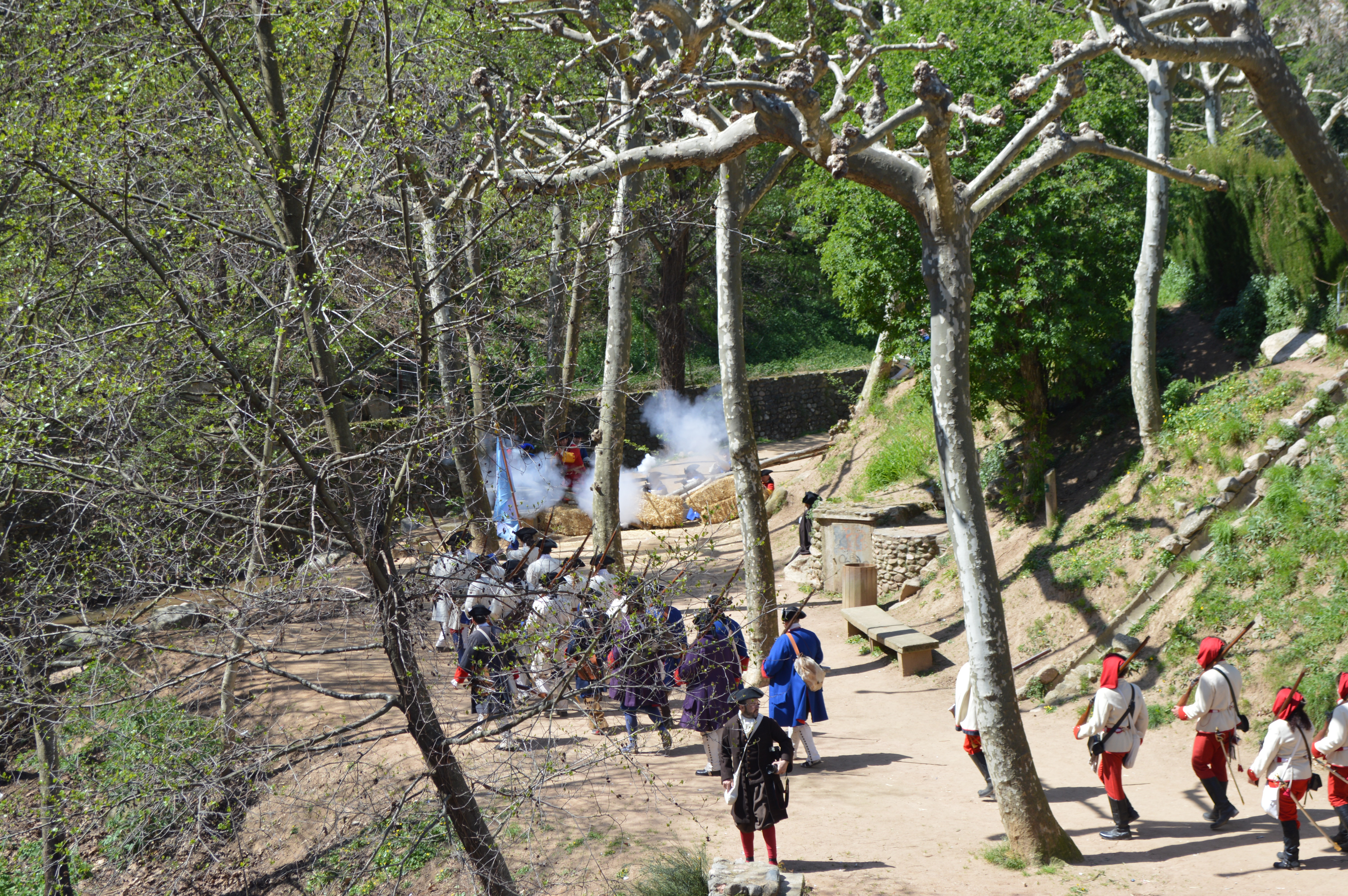 Representació de la primera emboscada que es realitzà a la columna borbònica durant la recreació del 12/04/2015.